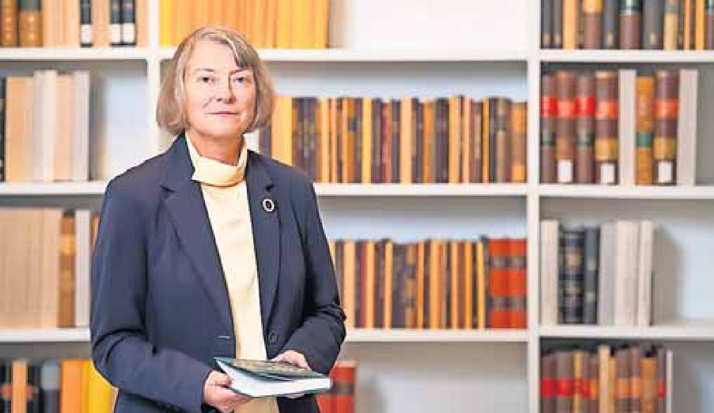 Prof. Dr. Martina Hartmann; Praesidentin Monumenta Germaniae Historica; Foto: © Astrid Eckert, Muenchen; ; fon: +49 171 26 89 601